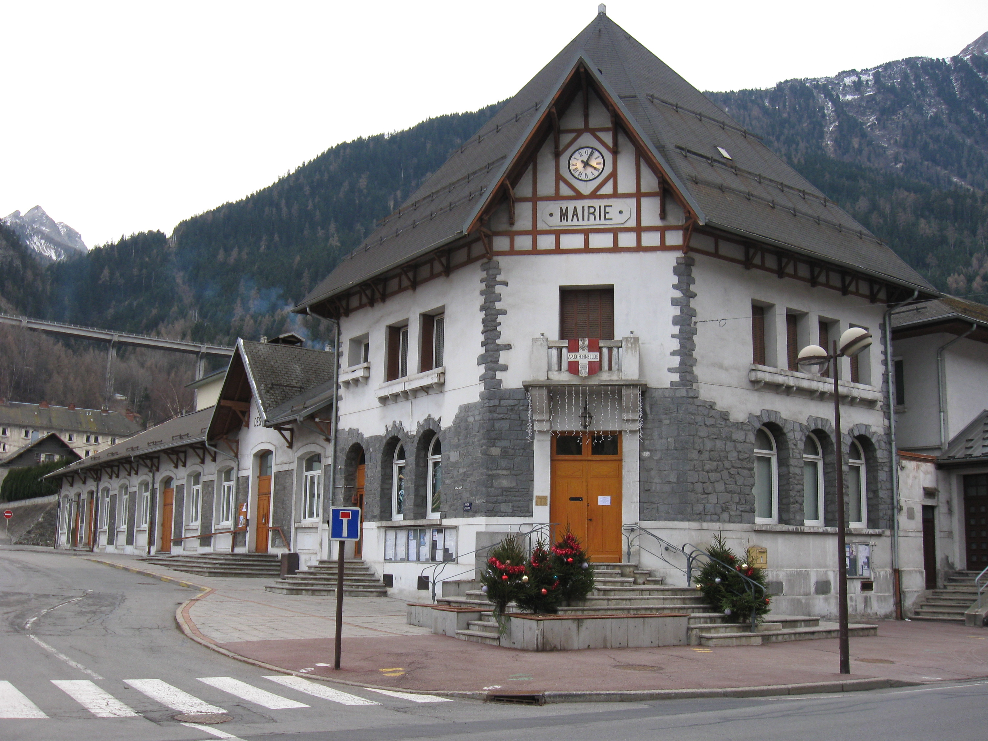 Mairie de Fourneaux. (Savoie, Auvergne-Rhône-Alpes).